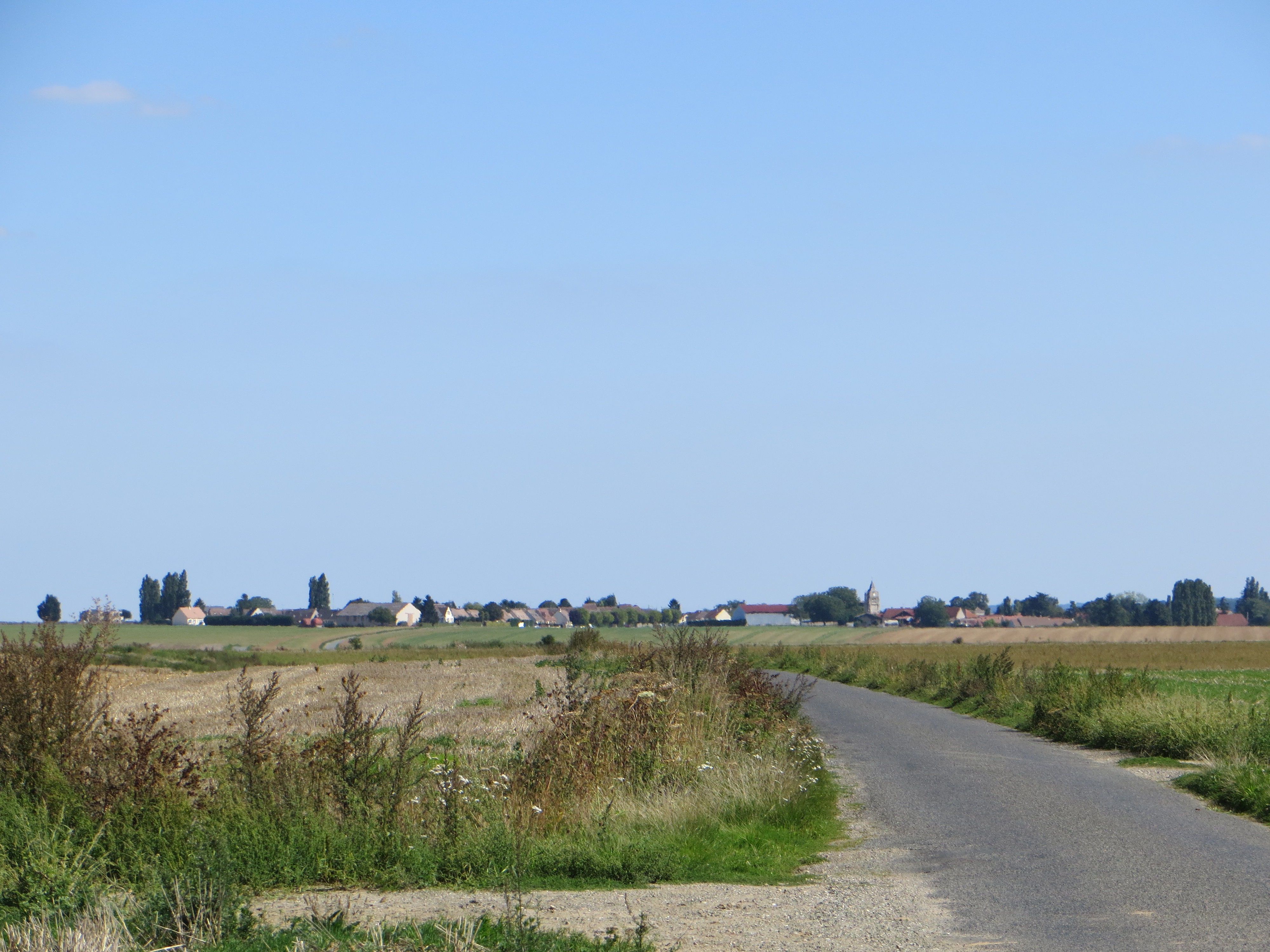 Vue générale du village